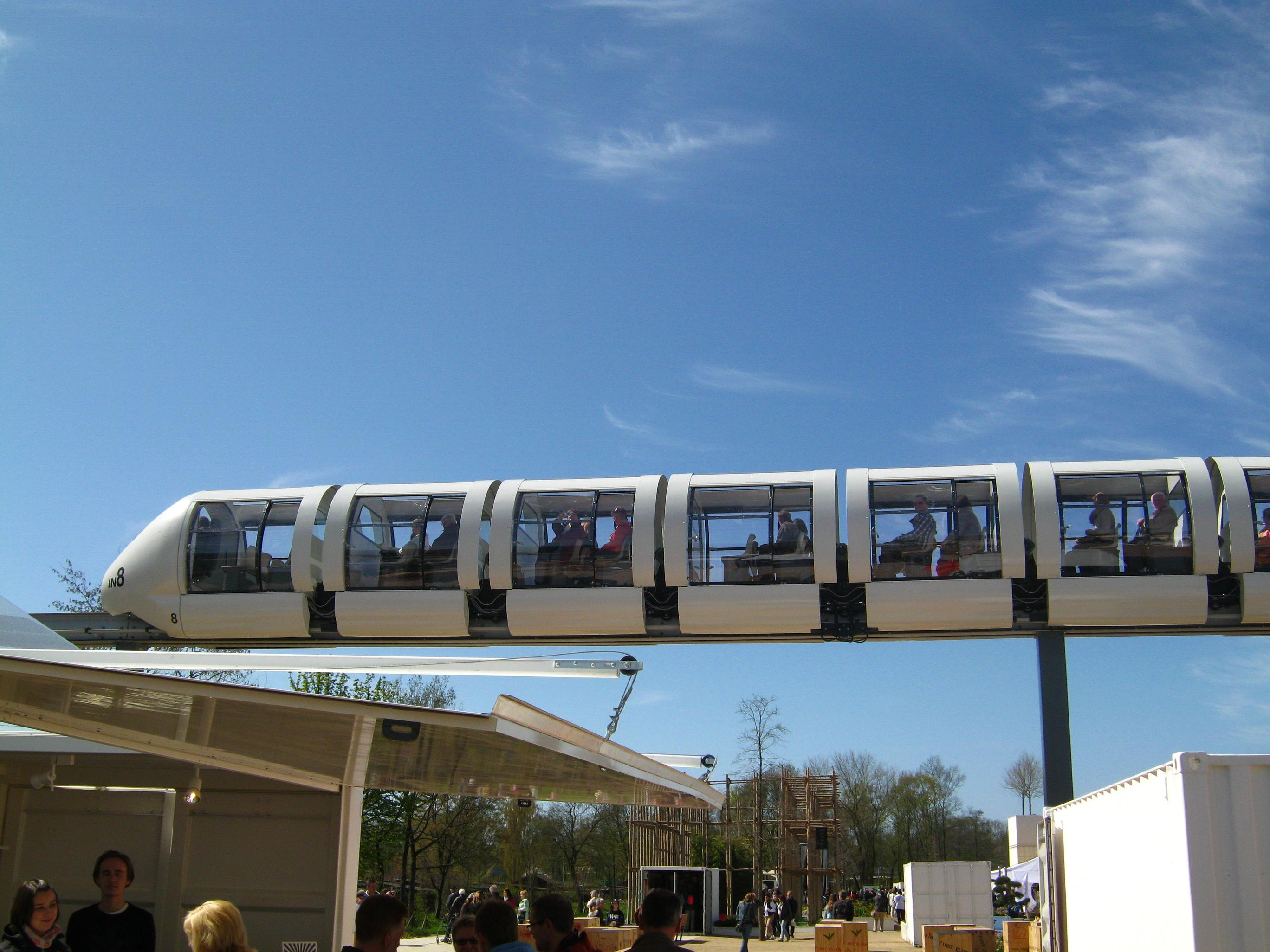 Gartenschaubahn der Internationalen Gartenschau Hamburg 2013 in Hamburg-Wilhelmsburg.